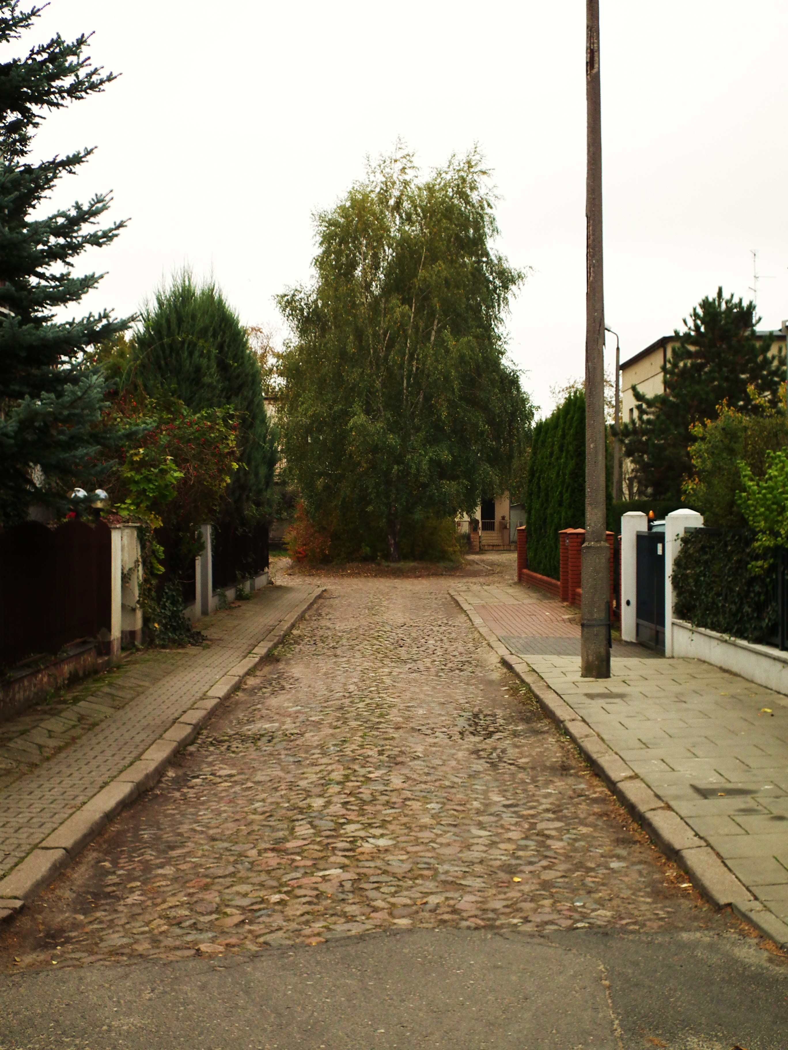 Sięgacz przy ul. Skarbka - Poznań.